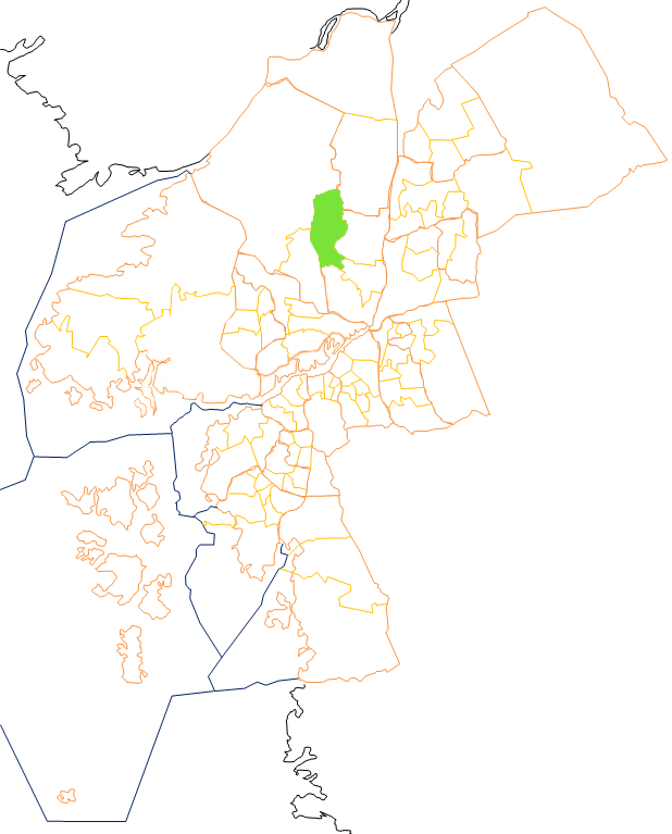 Karta som visar primärområdes belägenhet i Göteborg